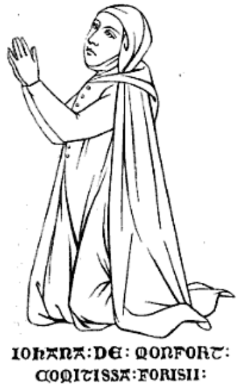 Dessin représentant Jeanne de Montfort de Chambéon, comtesse de Forez de 1270 à 1278, puis régente de 1278 à 1290, et baronne de Vaud de 1278 à 1300.